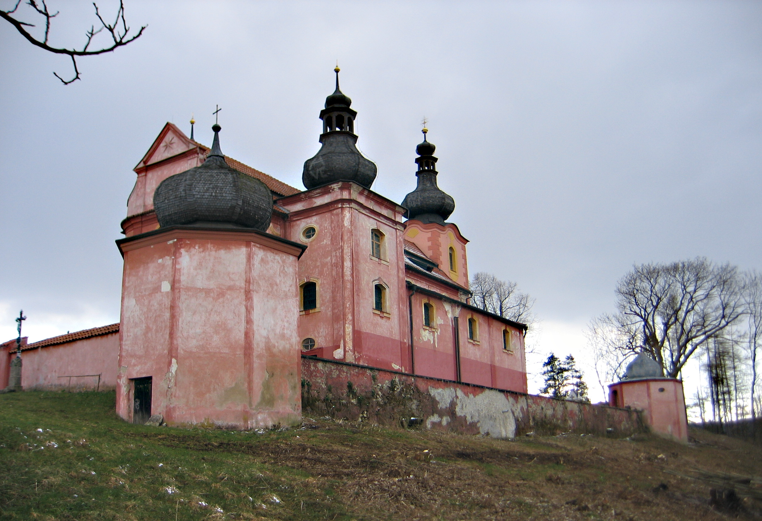 Strašín (okr. Klatovy), kostel Narození Panny Marie od severovýchodu. Na nárožích bývalé bašty, později kaple a márnice.